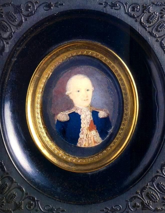 Portrait of Paul Antoine Fleuriot de Langle